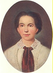 spisovatelka Ann Sázavská-Fričová